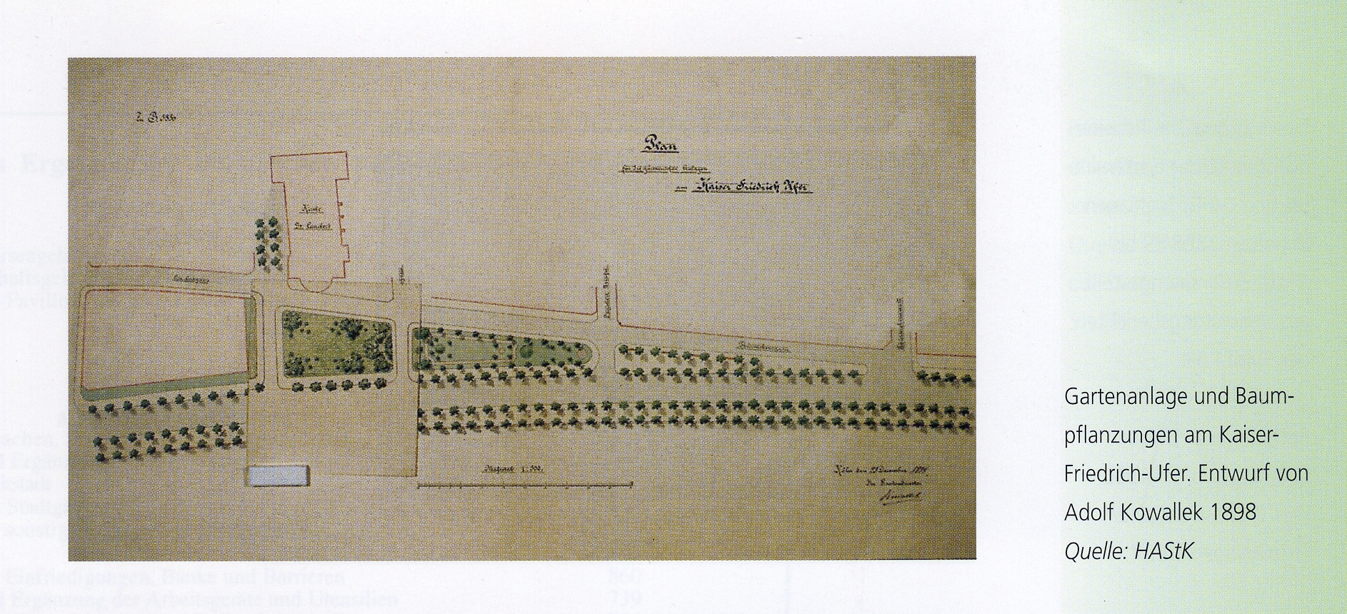 Entwurf Adolf Kowalleks zu einer Detailanlage des Kölner Kaiser-Friedrich-Ufers im Jahr 1898